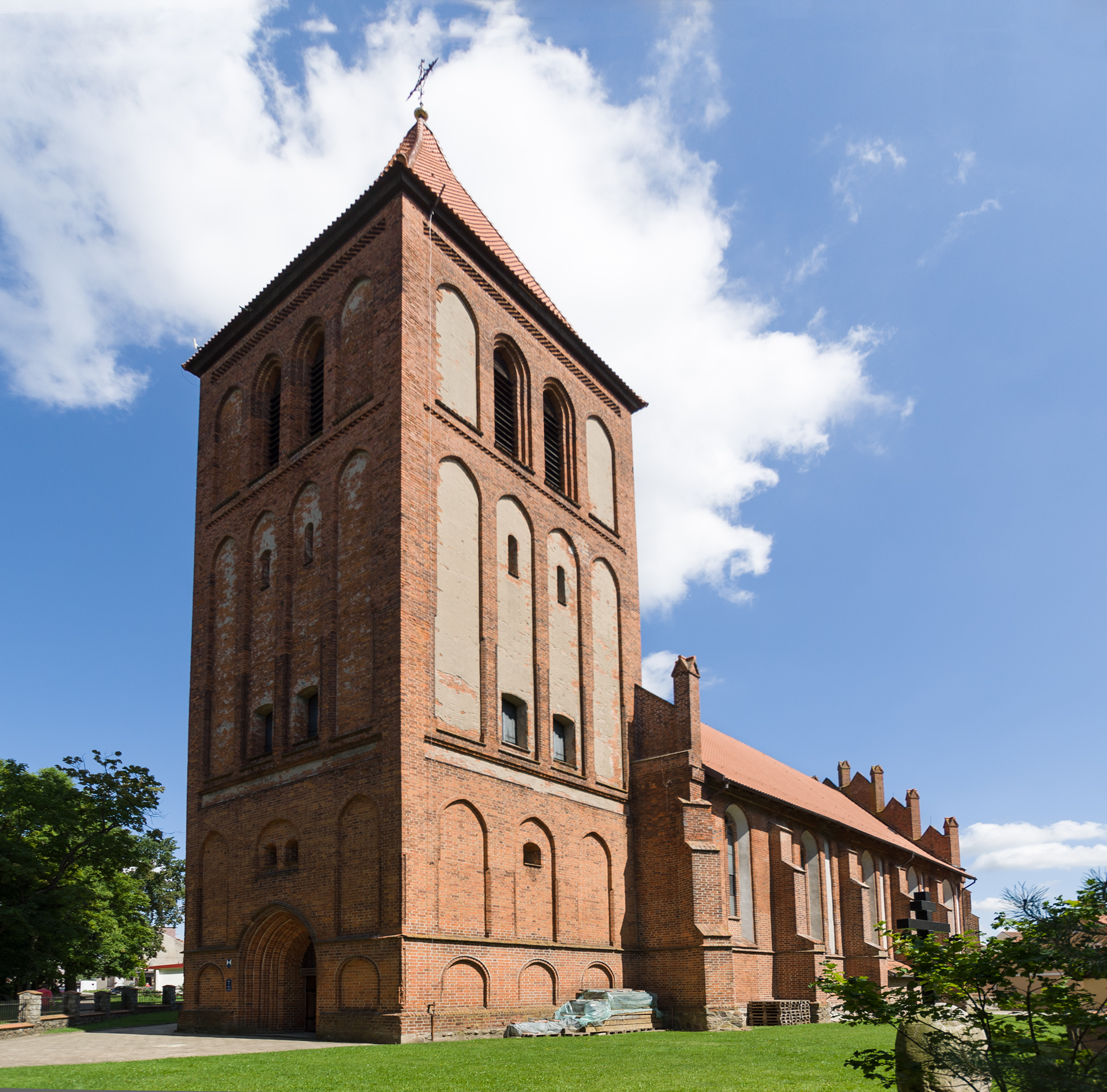 Cerkiew Podwyższenia Krzyża Świętego w Górowie Iławeckim.